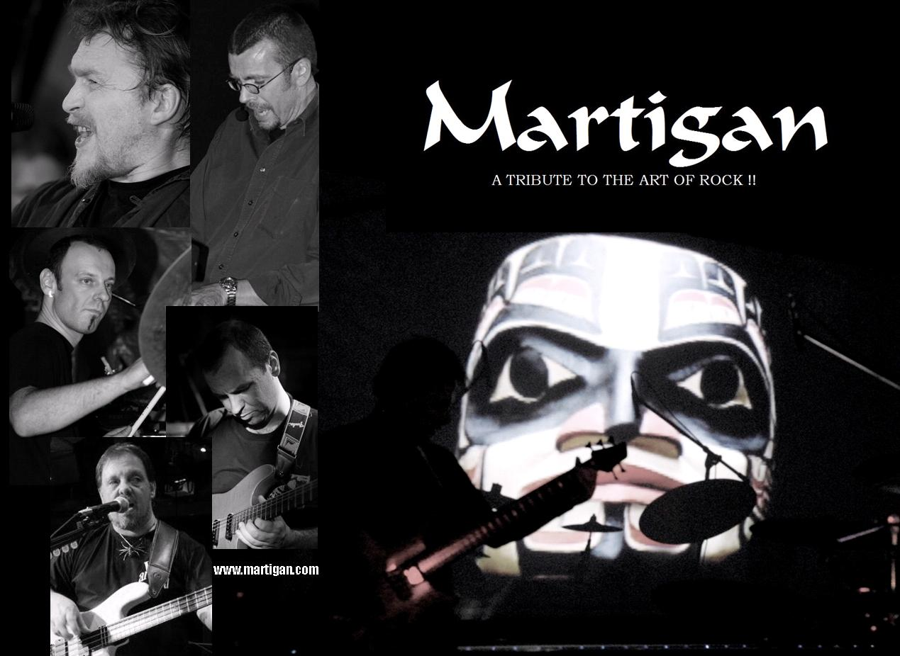 Collage Band Martigan